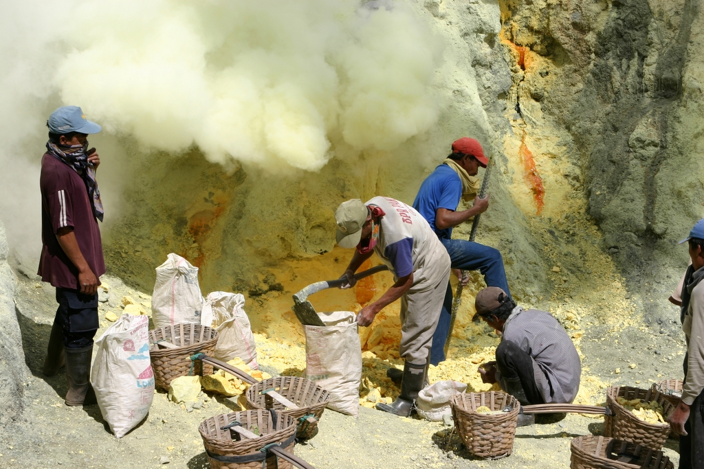 Sulfur mining operation at Kawah Ijen, Java, Indonesia.